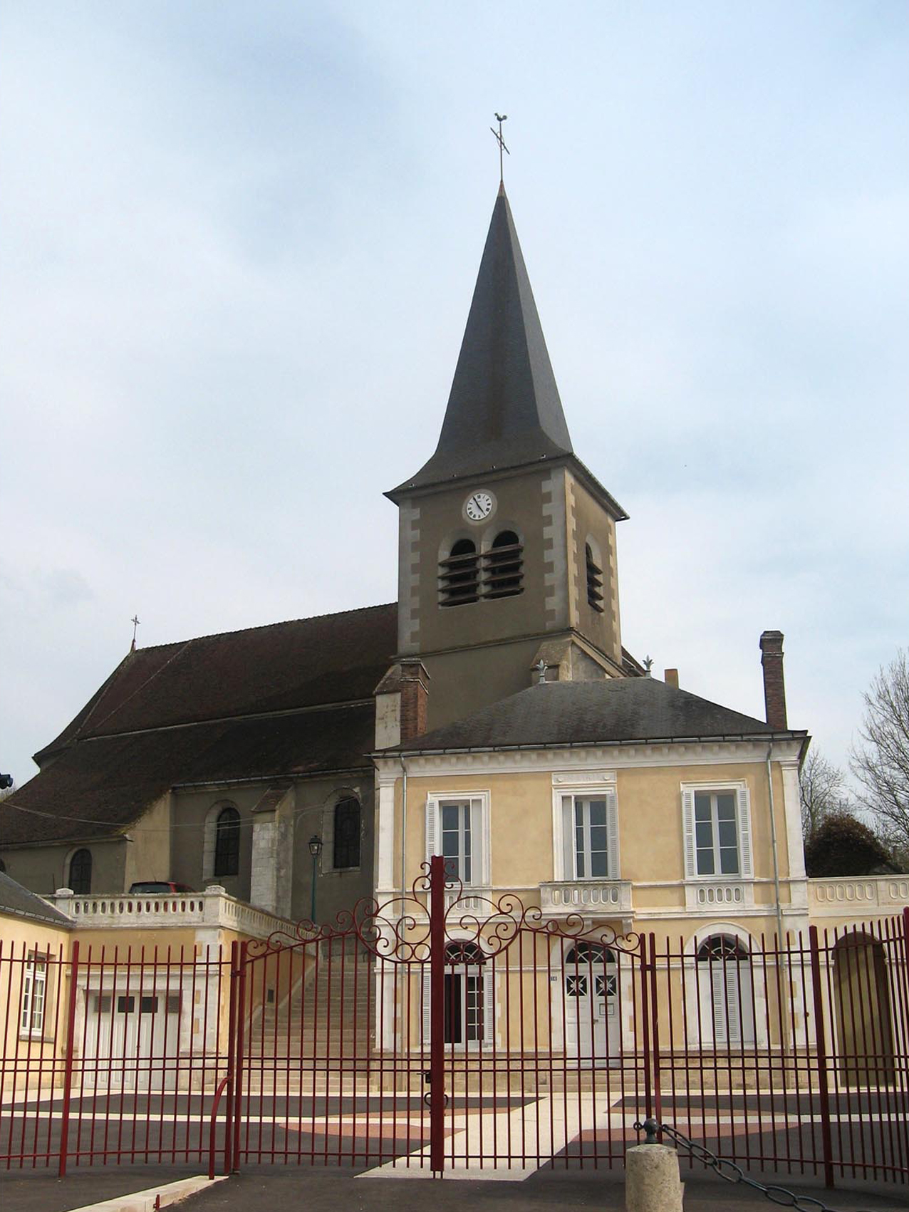 Venizy (Yonne)